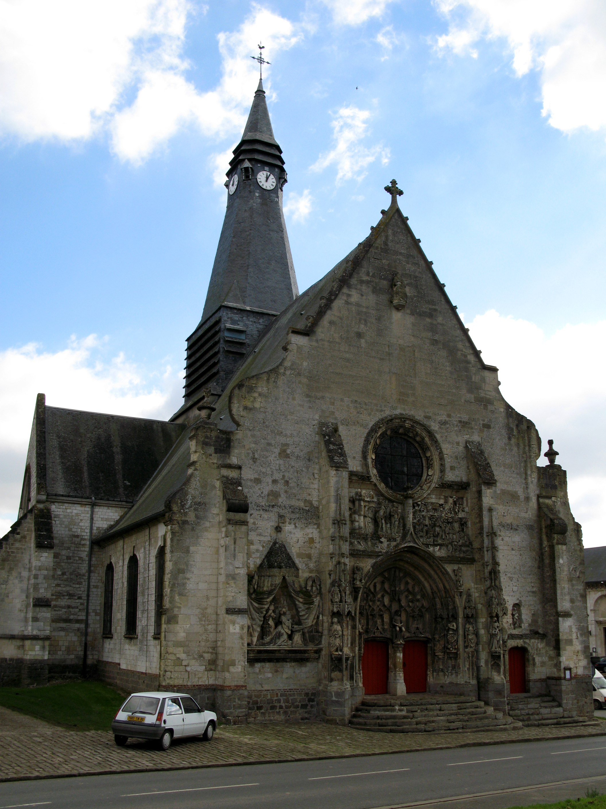 Mailly-Maillet (Somme, France) - L'église.